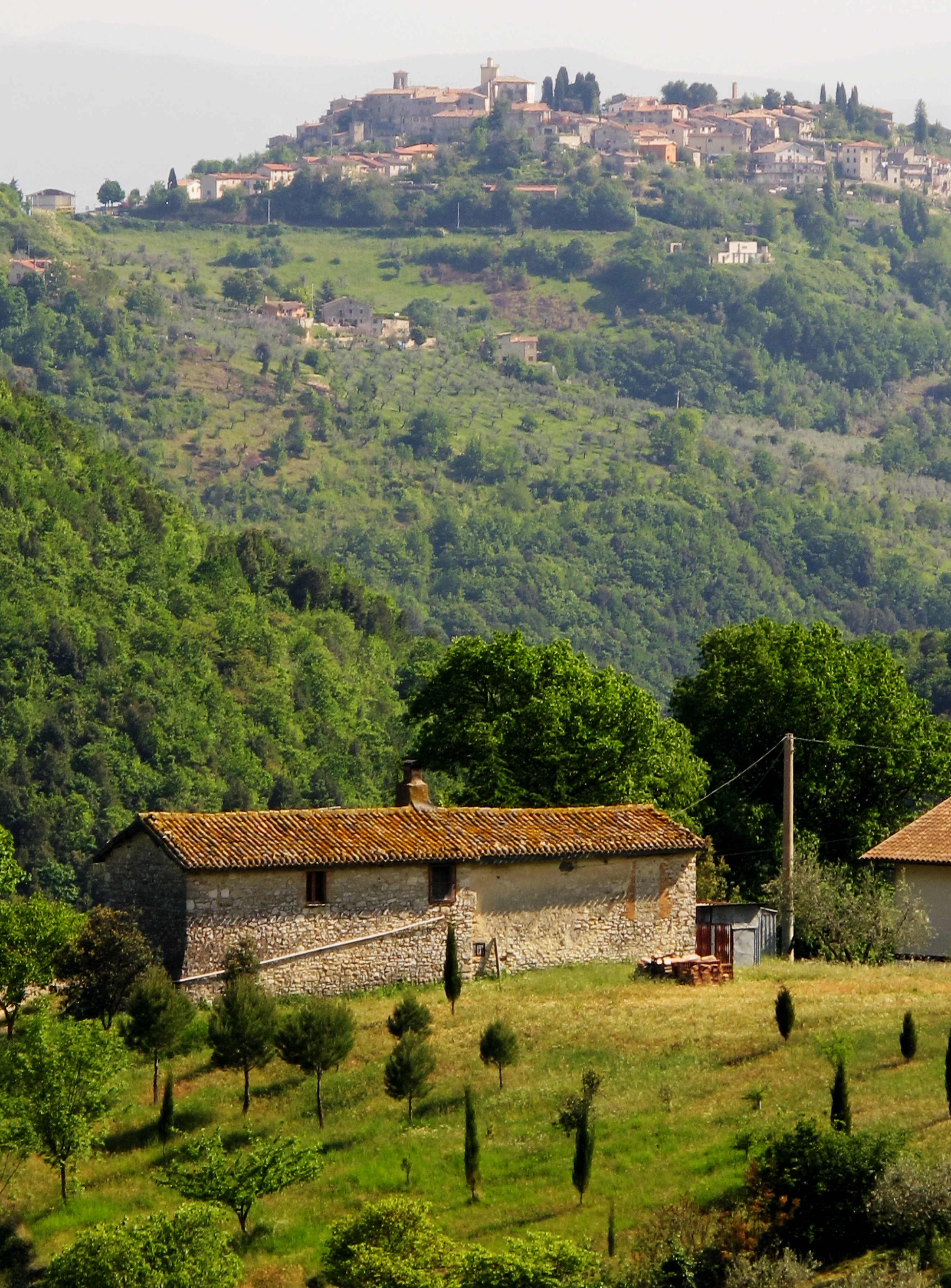 Paesaggio di Montenero Sabino - provincia di Rieti, Lazio